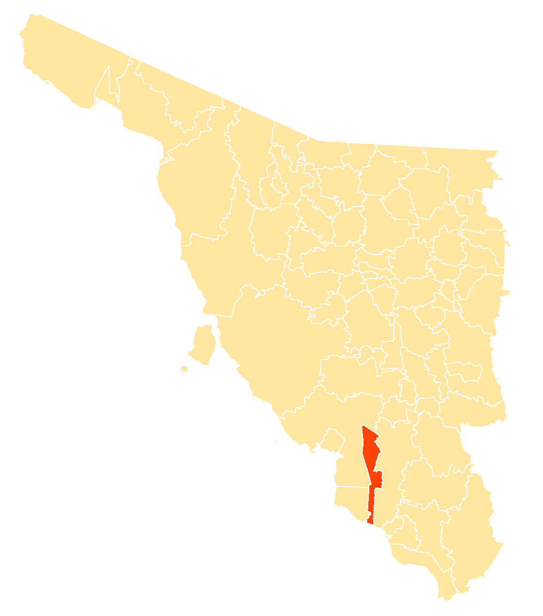 Municipio en Sonora, México.